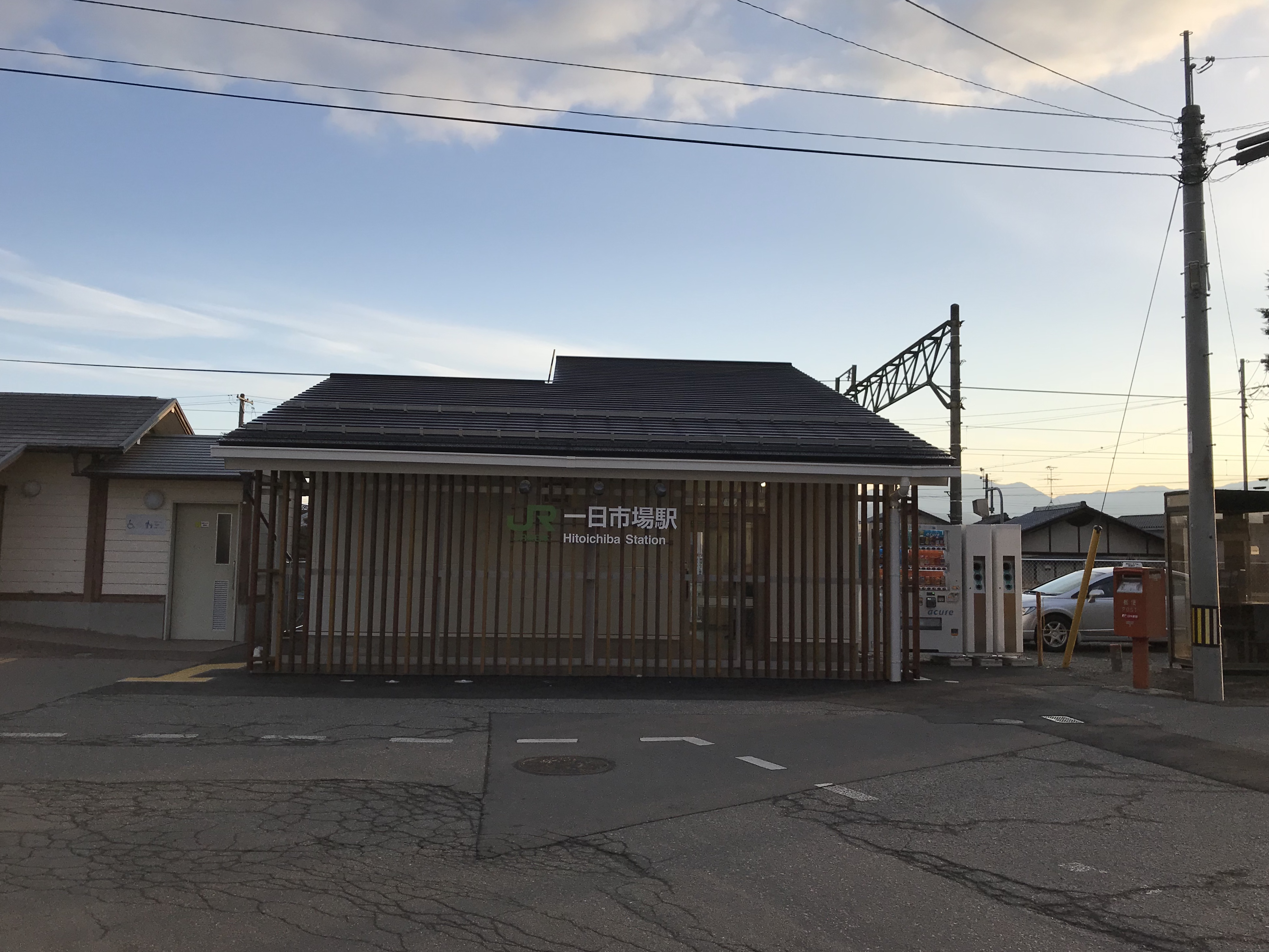 JR東日本一日市場駅の新駅舎です。